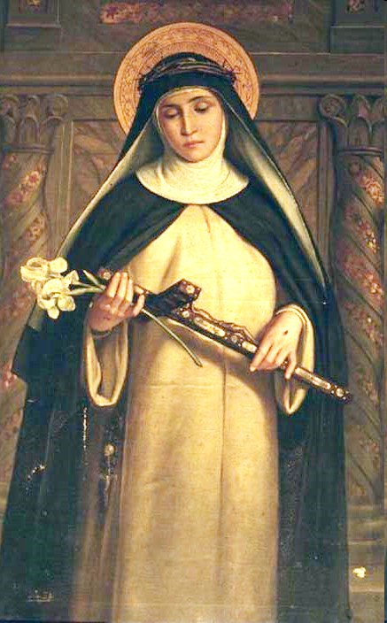 Saint Catherine of Siena. From chiesa di Santa Maria del Rosario in Prati, Roma